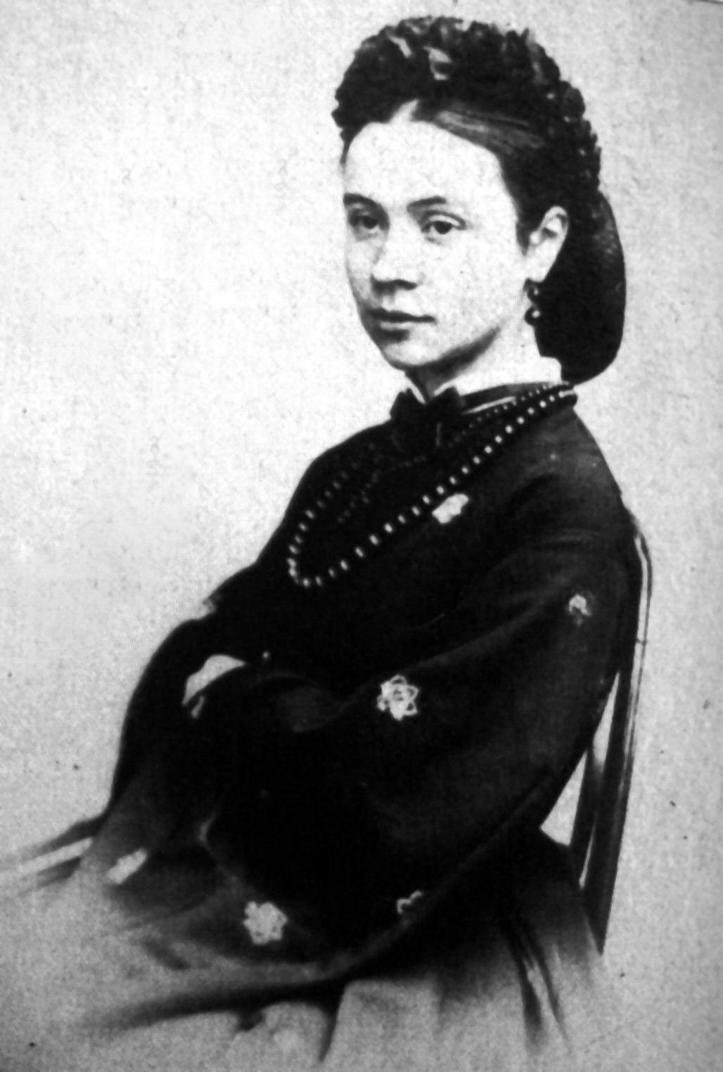 Olga Smirnitskaja, die Adressatin von 100 Liebesbriefen von Johann Strauß